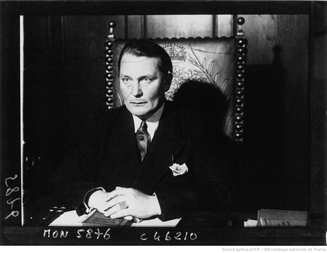 Hermann Goering en su despacho en 1932.